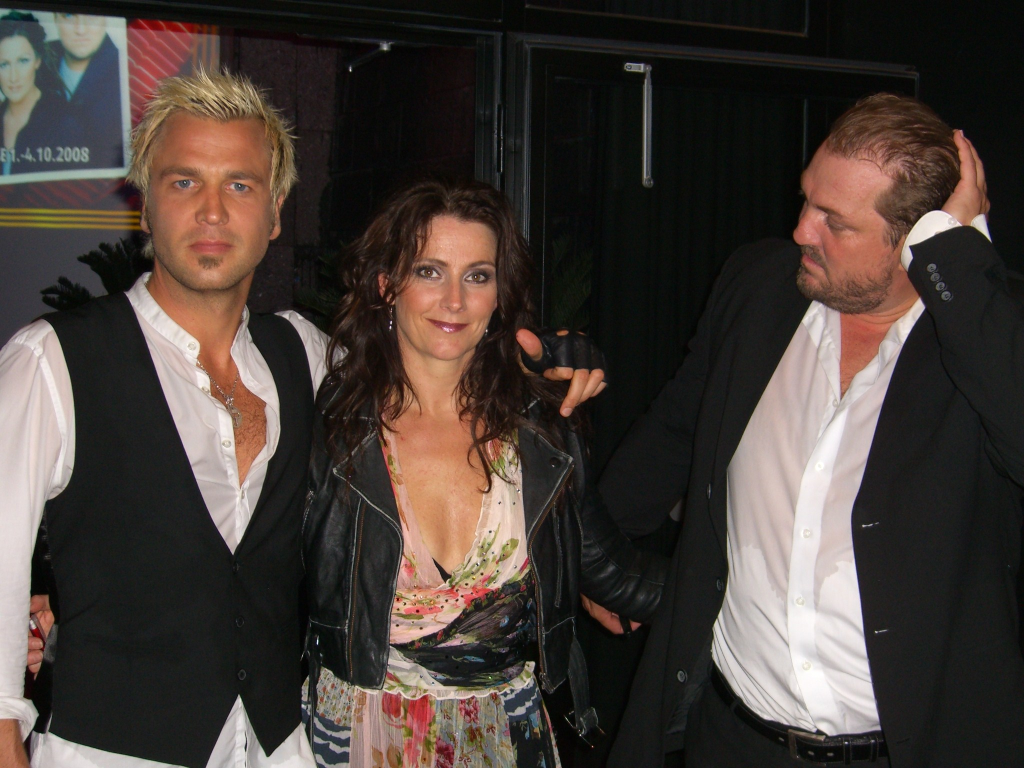 El grupo sueco Ace Of Base antes de su concierto en Vantaa, Finlandia el 2 de Octubre de 2008.